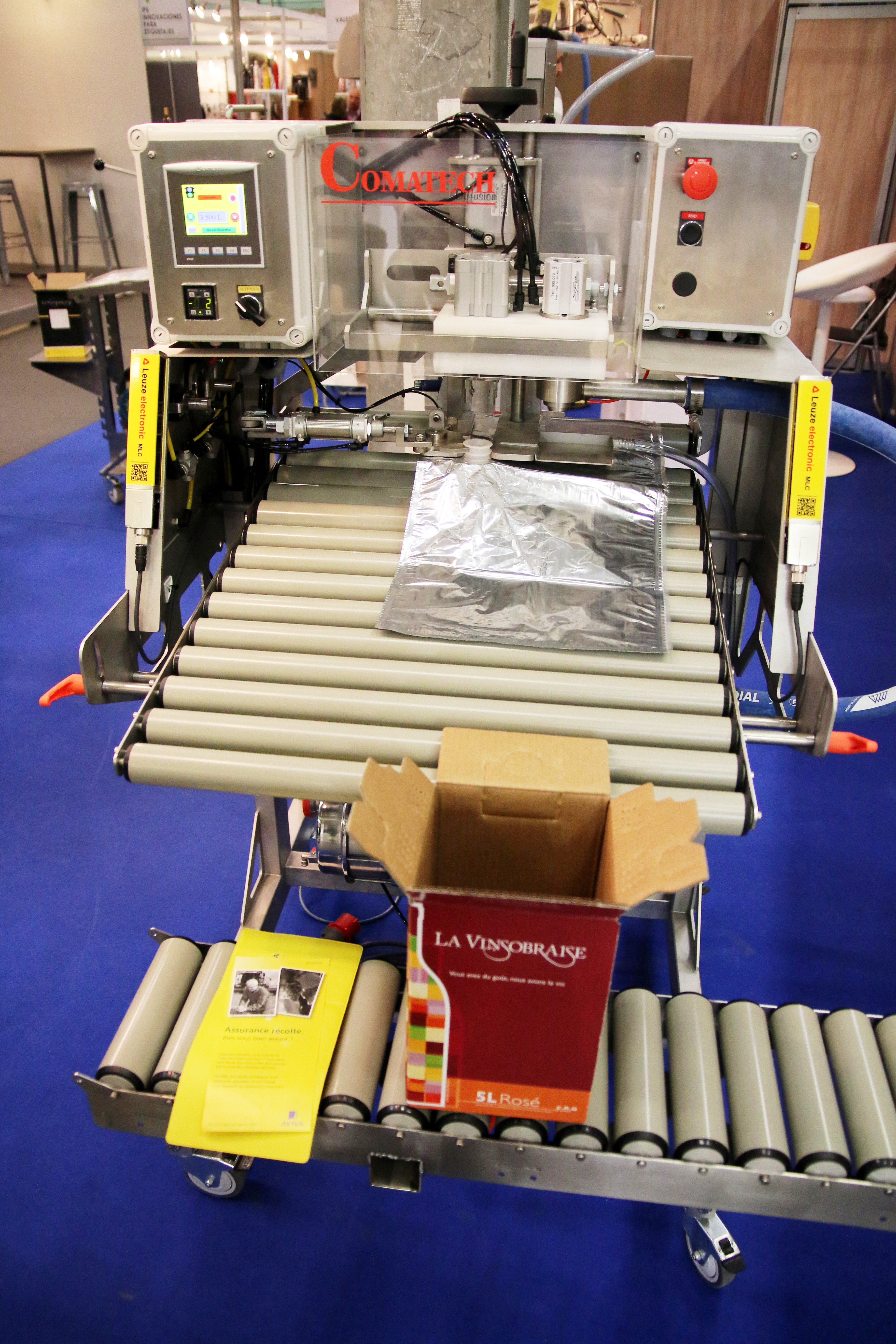 Remplisseuse de bag in box